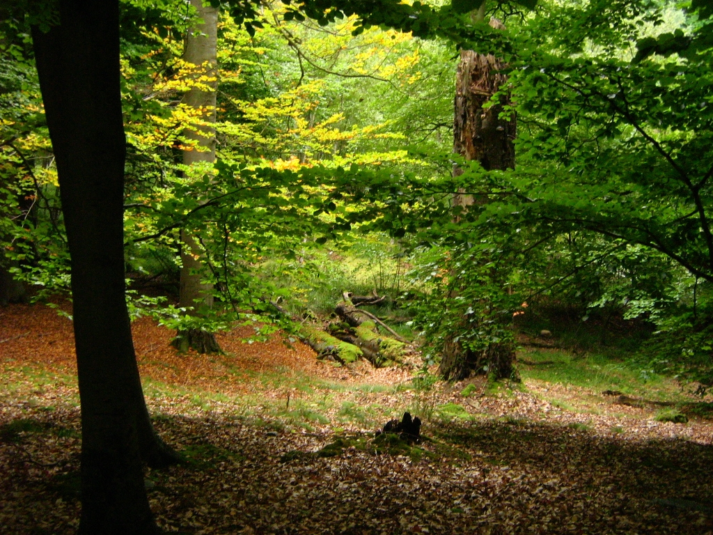 Laubwald am Teufelssee bei Thelkow